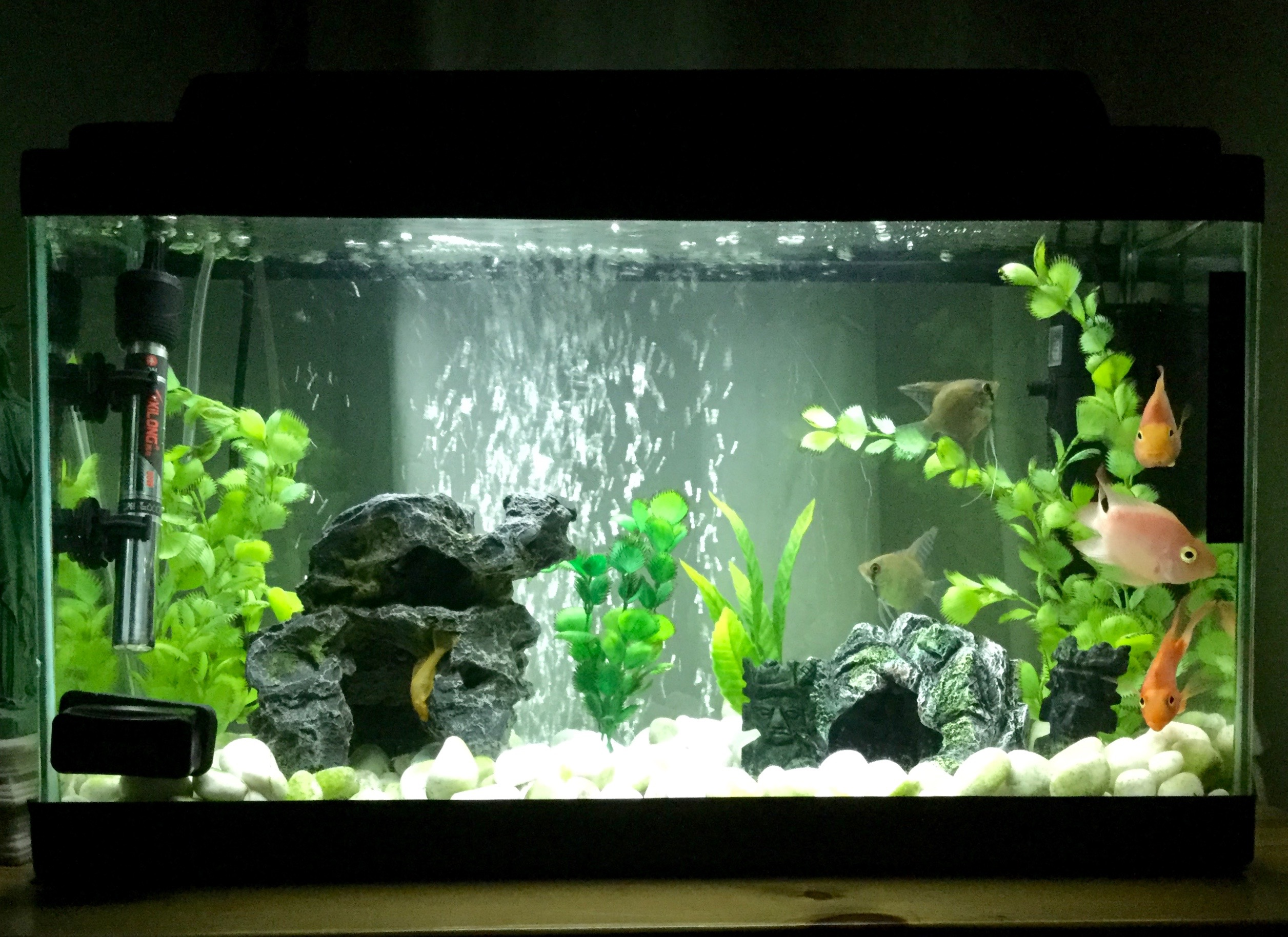 אקווריום מים מתוקים עם דגי תוכי וסקלאר